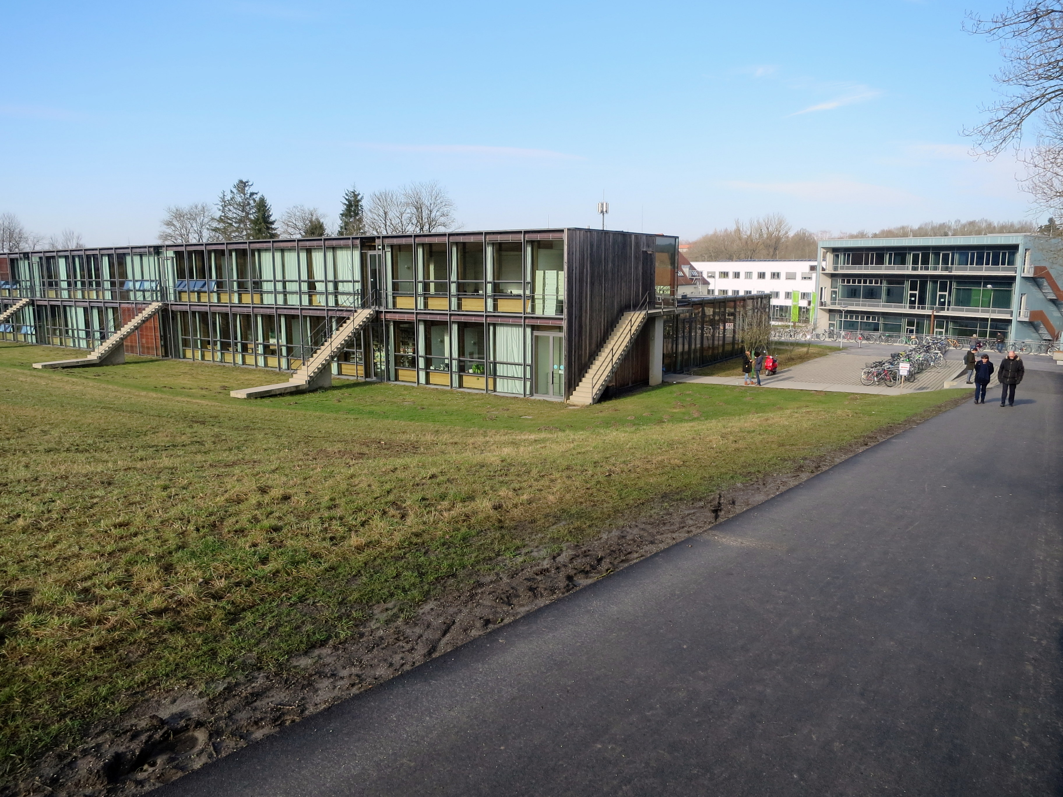 Aufgestockte Hörsaalflucht und dahinter Gebäude für das Grundstudium an der HSWT